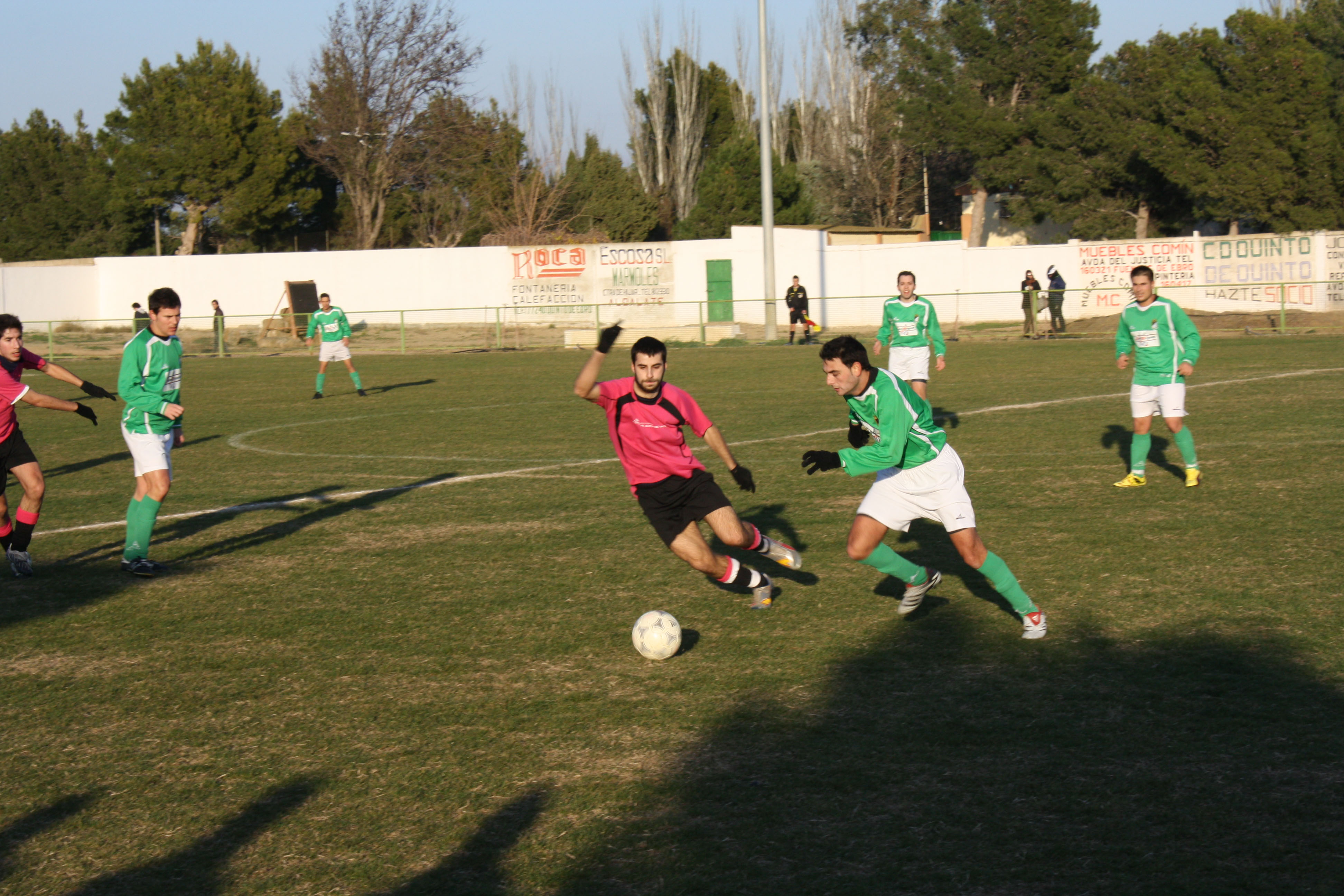 Quinto 0 - Altorricón 3 (13.12.2009)